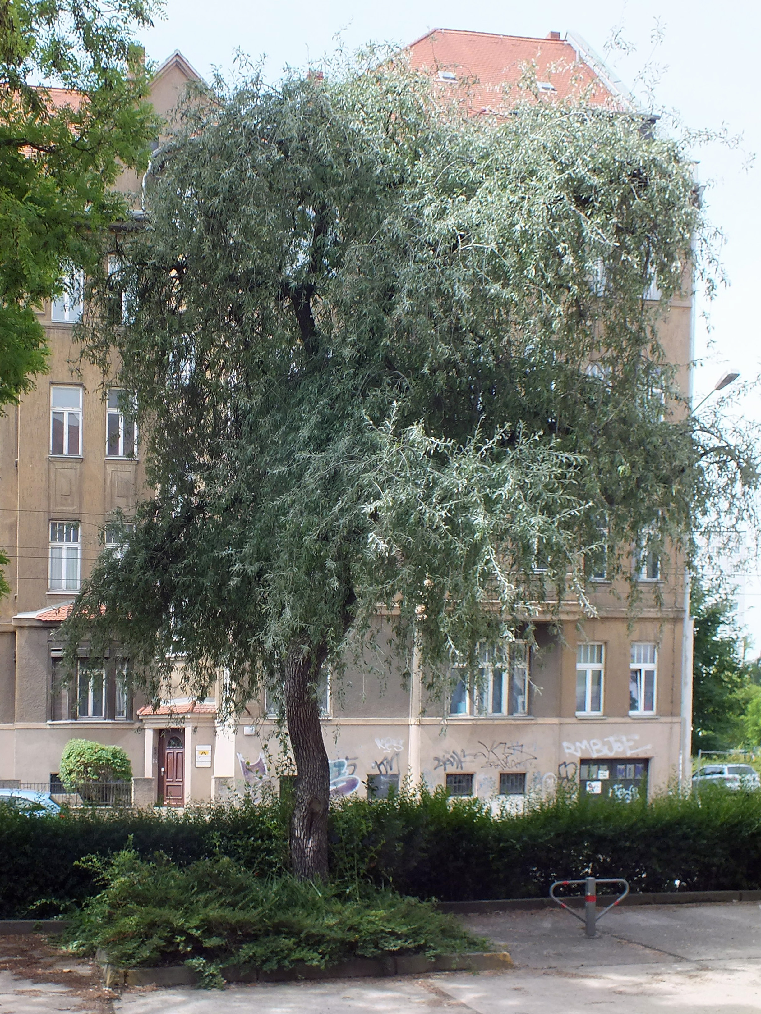 Weidenblättrige Birne am "Roten Haus", Philipp-Rosenthal-Straße 55, in Leipzig